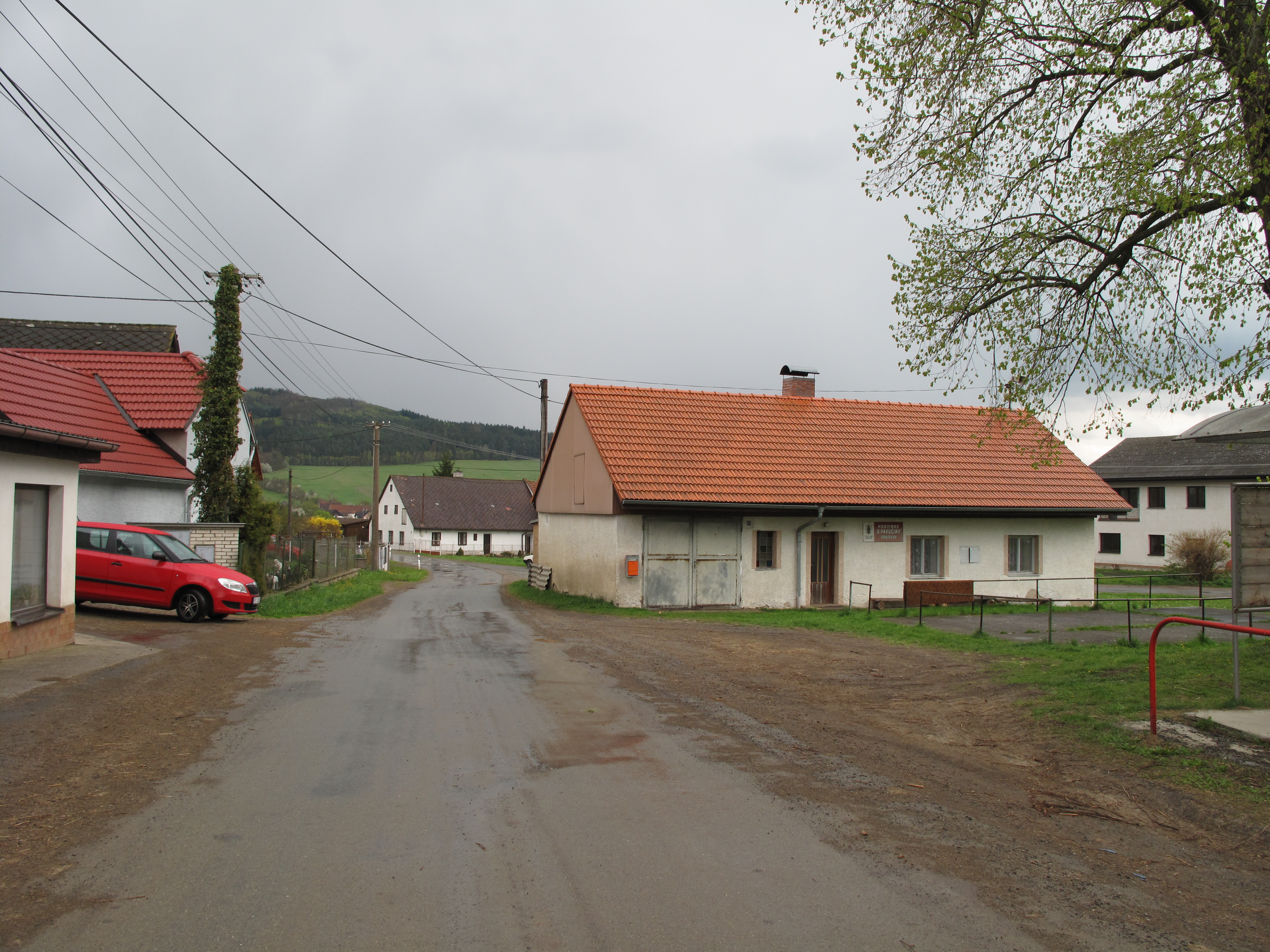 Zdeslav (Poleň). Okres Klatovy, Česká republika.